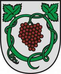 Coaf of arms of Kráľovský Chlmec